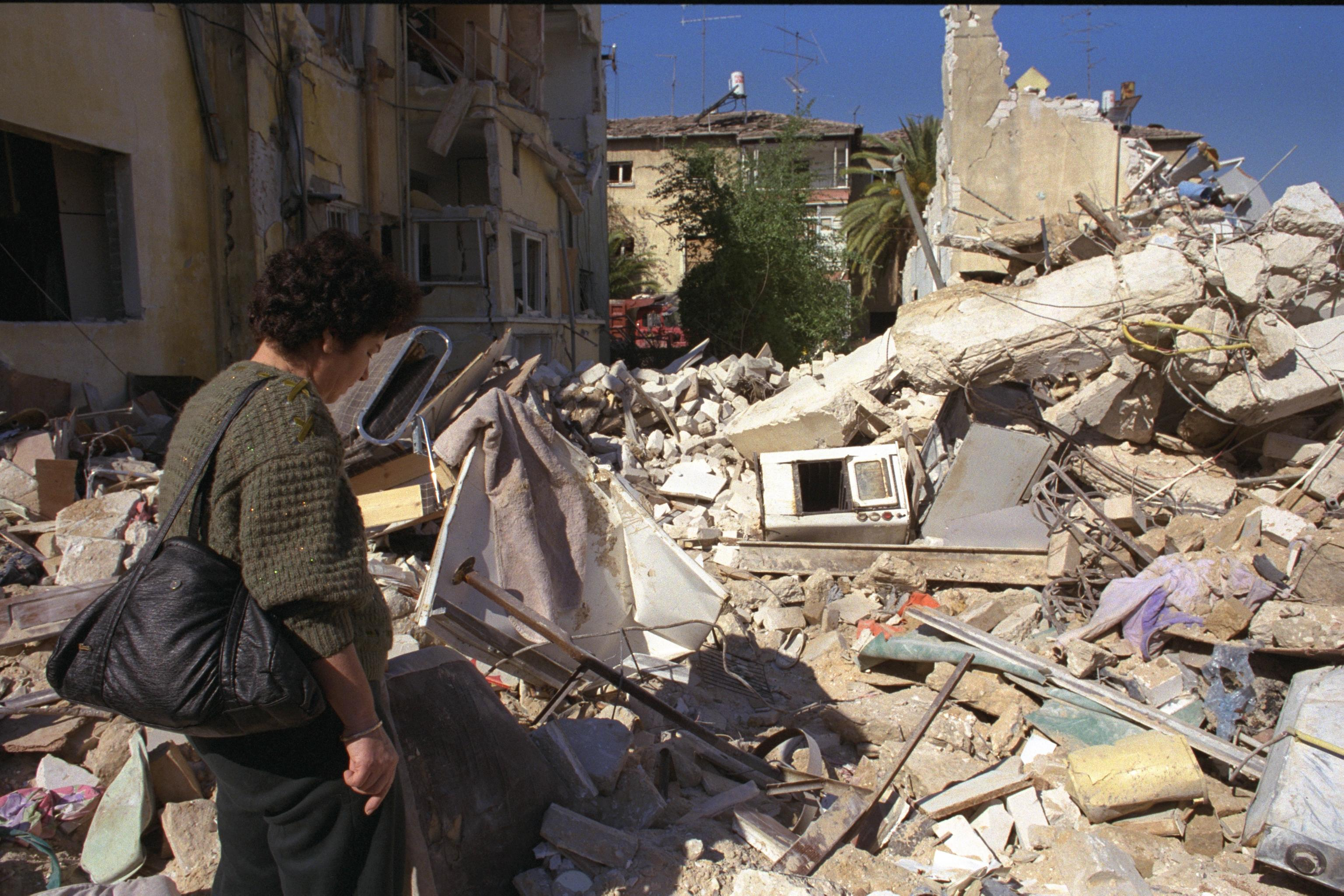 A resident of Abba Hillel street, Ramat Gan searching through the ruins of her home. Photo: ALPERT NATHAN, GPO. 30/01/1991 מלחמת המפרץ. בצילום, תושבת רחוב אבא הילל ברמת גן מביטה בהריסות ביתה, שנהרס בהתקפת טילי סקאד ששוגרו מעיראק.